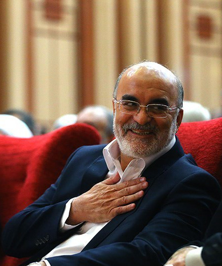 ناصر سراج در مراسم تودیع و معارفه رئیس سازمان بازرسی کل کشور (شهریور ۱۳۹۲)